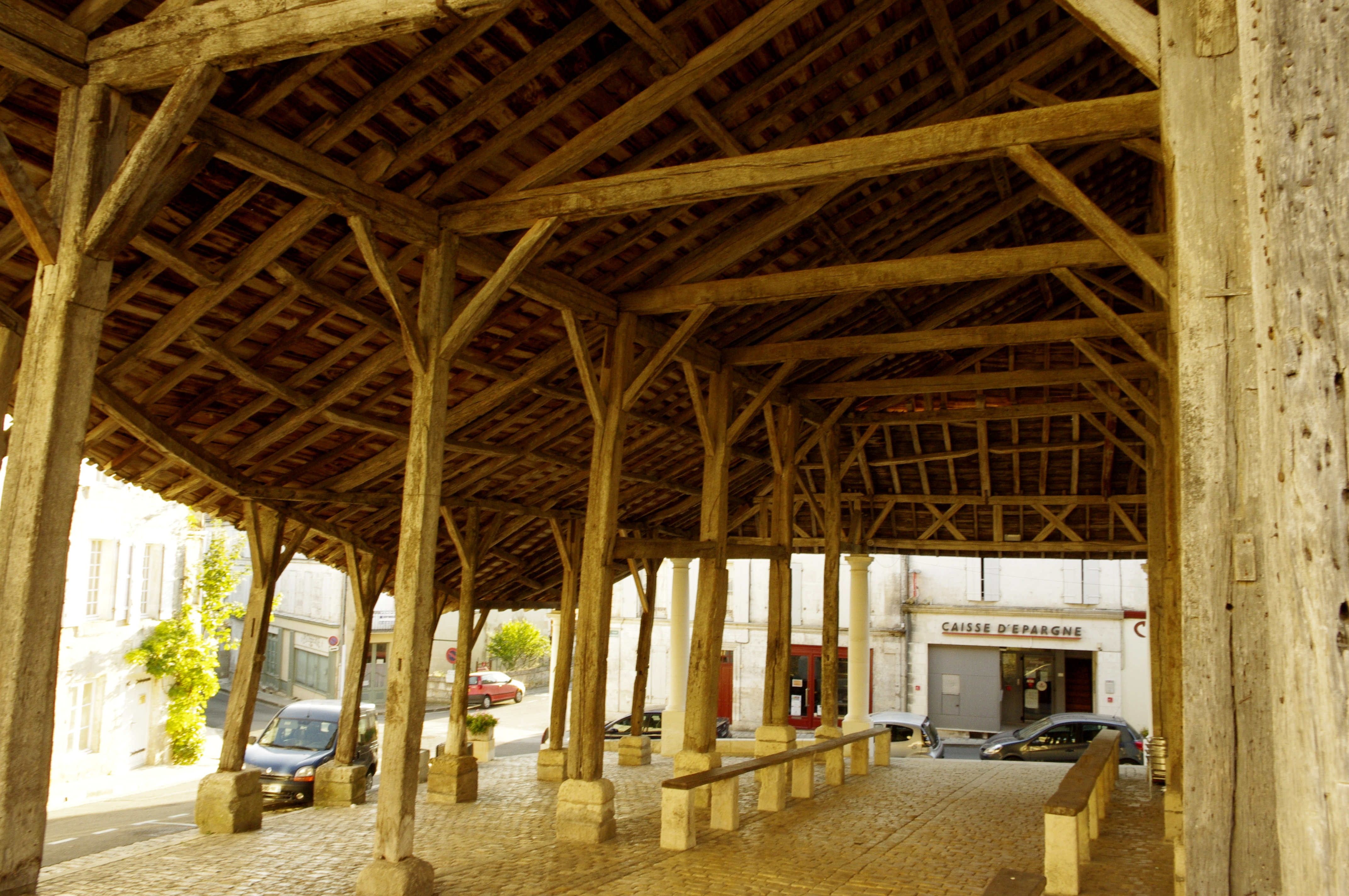 Halle de marché de Villebois-Lavalette, Charente